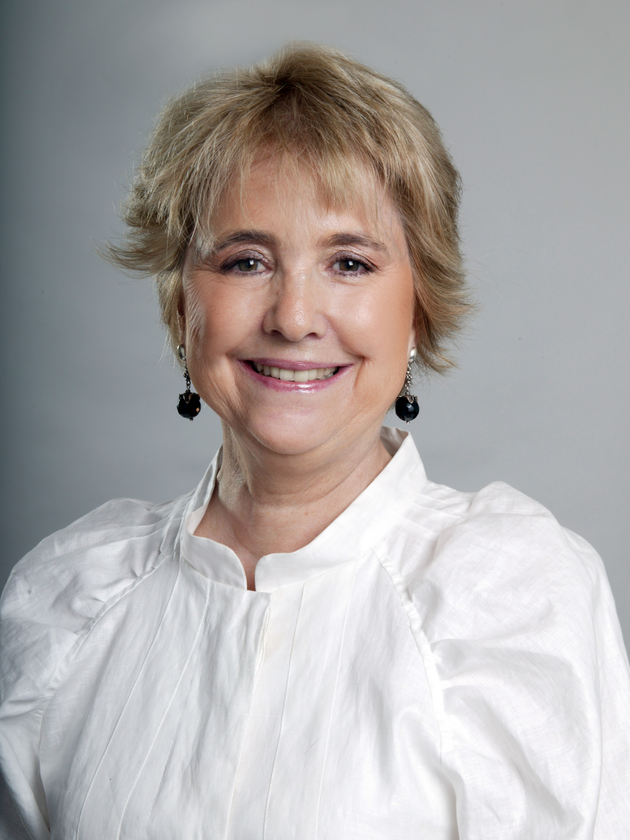 Magdalena Matte, ingeniero y empresaria chilena.